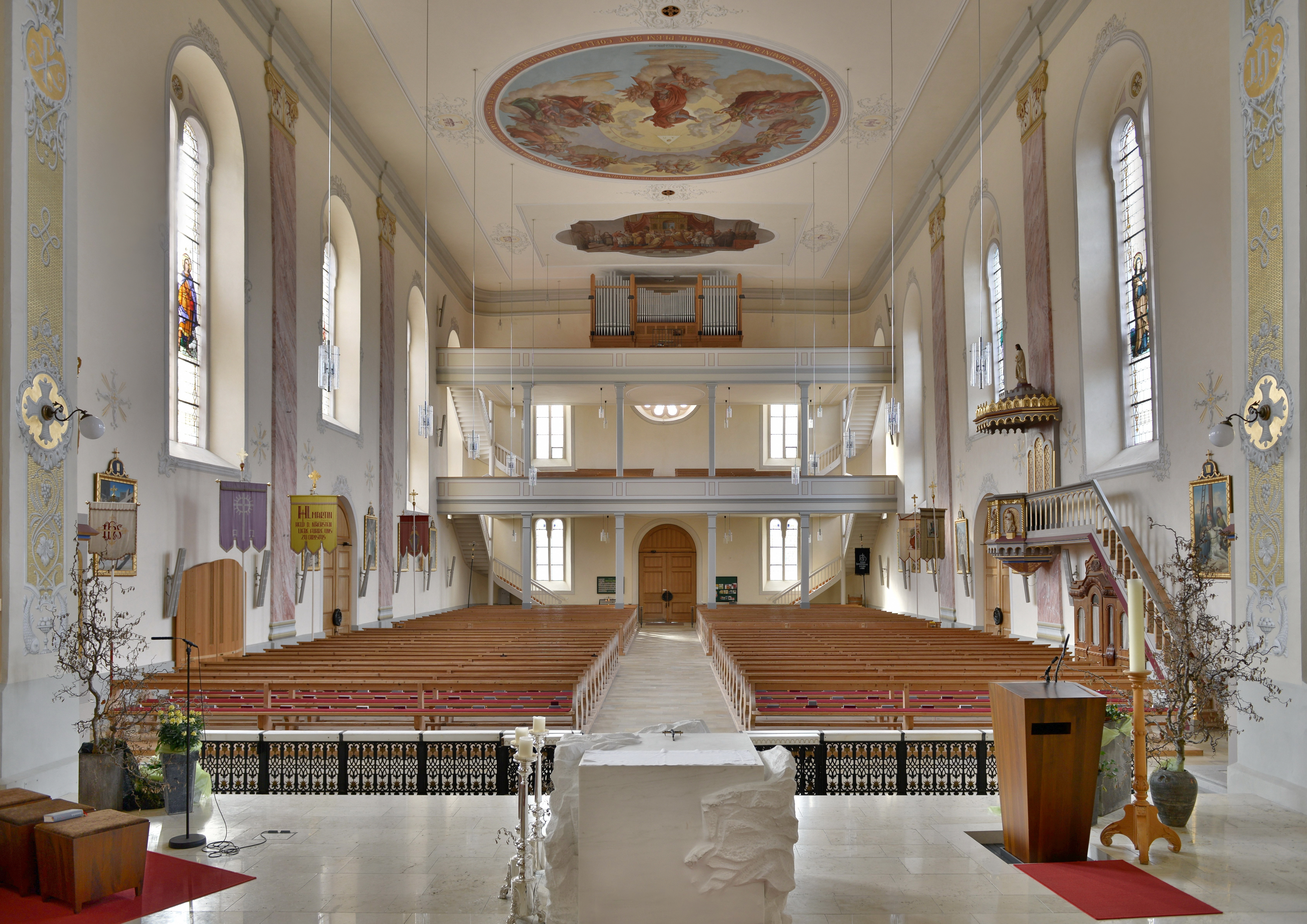 Kath. Pfarrkirche hl. Martin in Hof, Alberschwende.